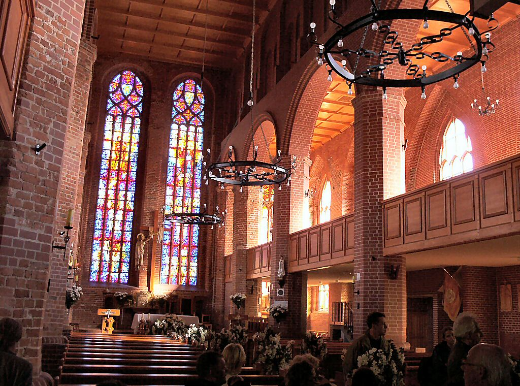 Wolin - kolegiata (wnętrze)